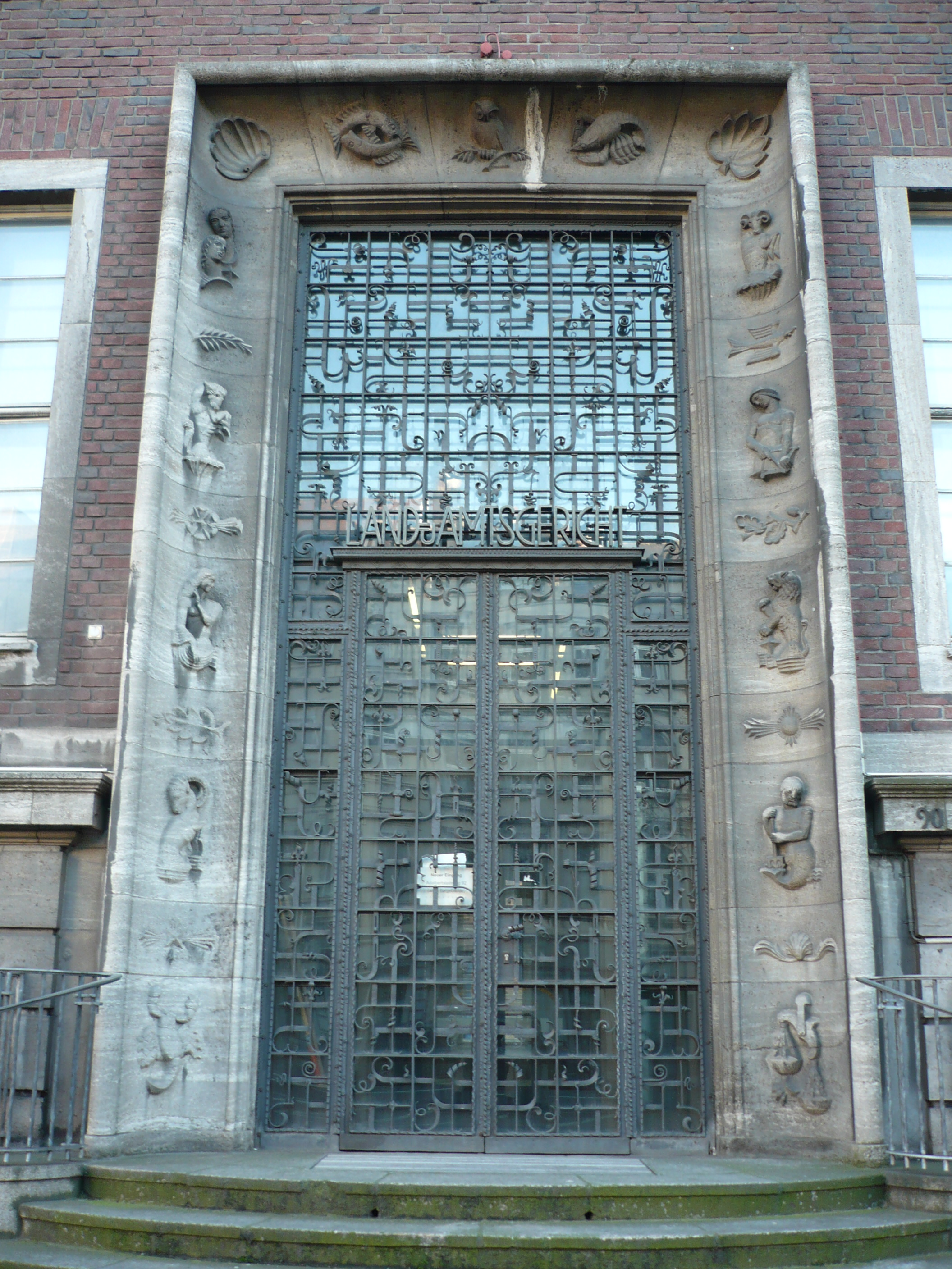 Hauptportal des ersten Gerichtserweiterungsgebäudes in Aachen, Kunstschmiedearbeit von Carl Wyland